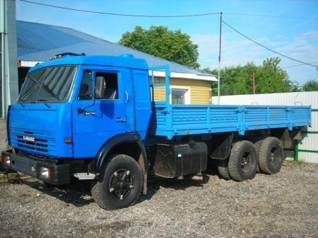 10 тонник 53212